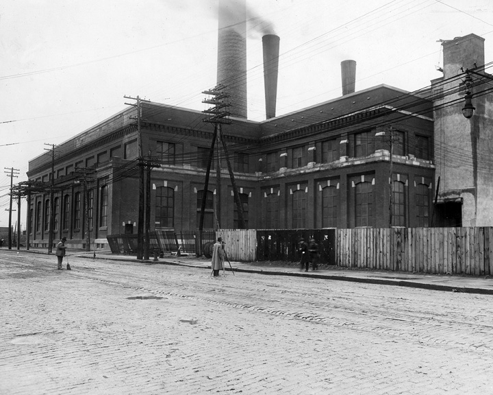 Centrale électrique d'hochelaga pour l'alimentation du réseau de tramways.